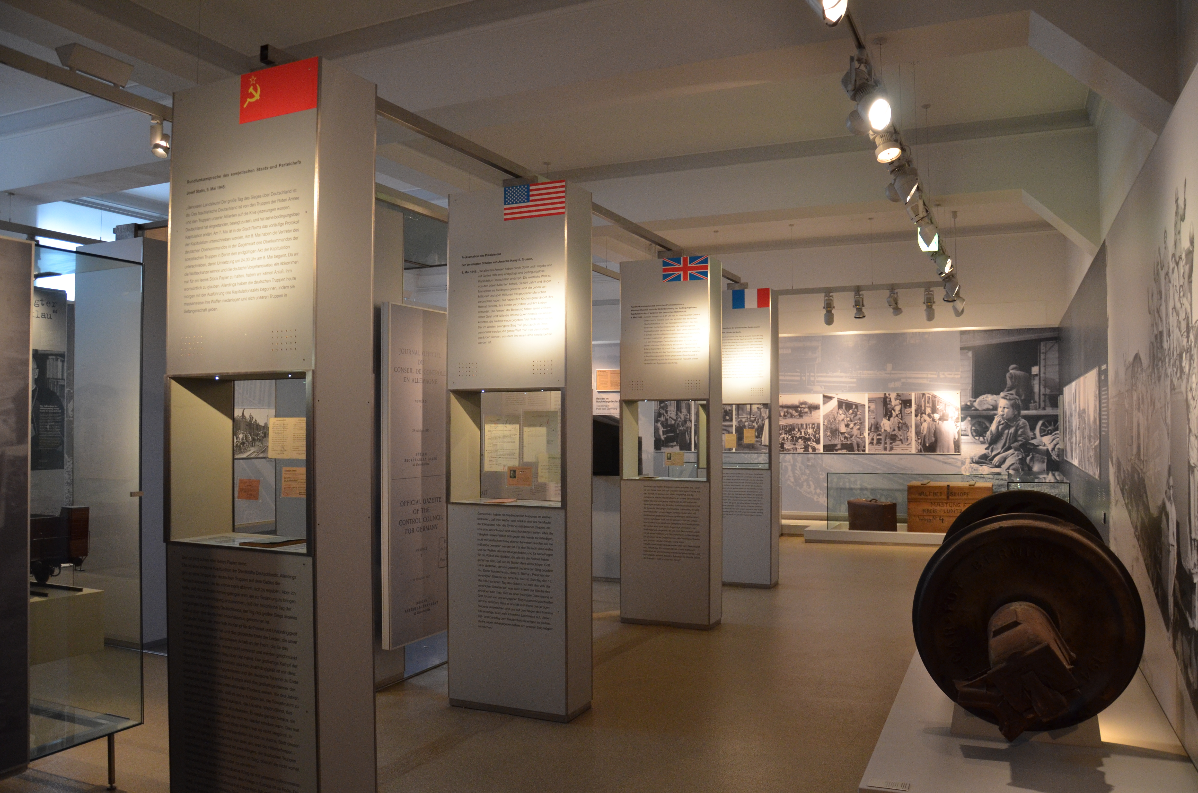 DB Museum Nürnberg